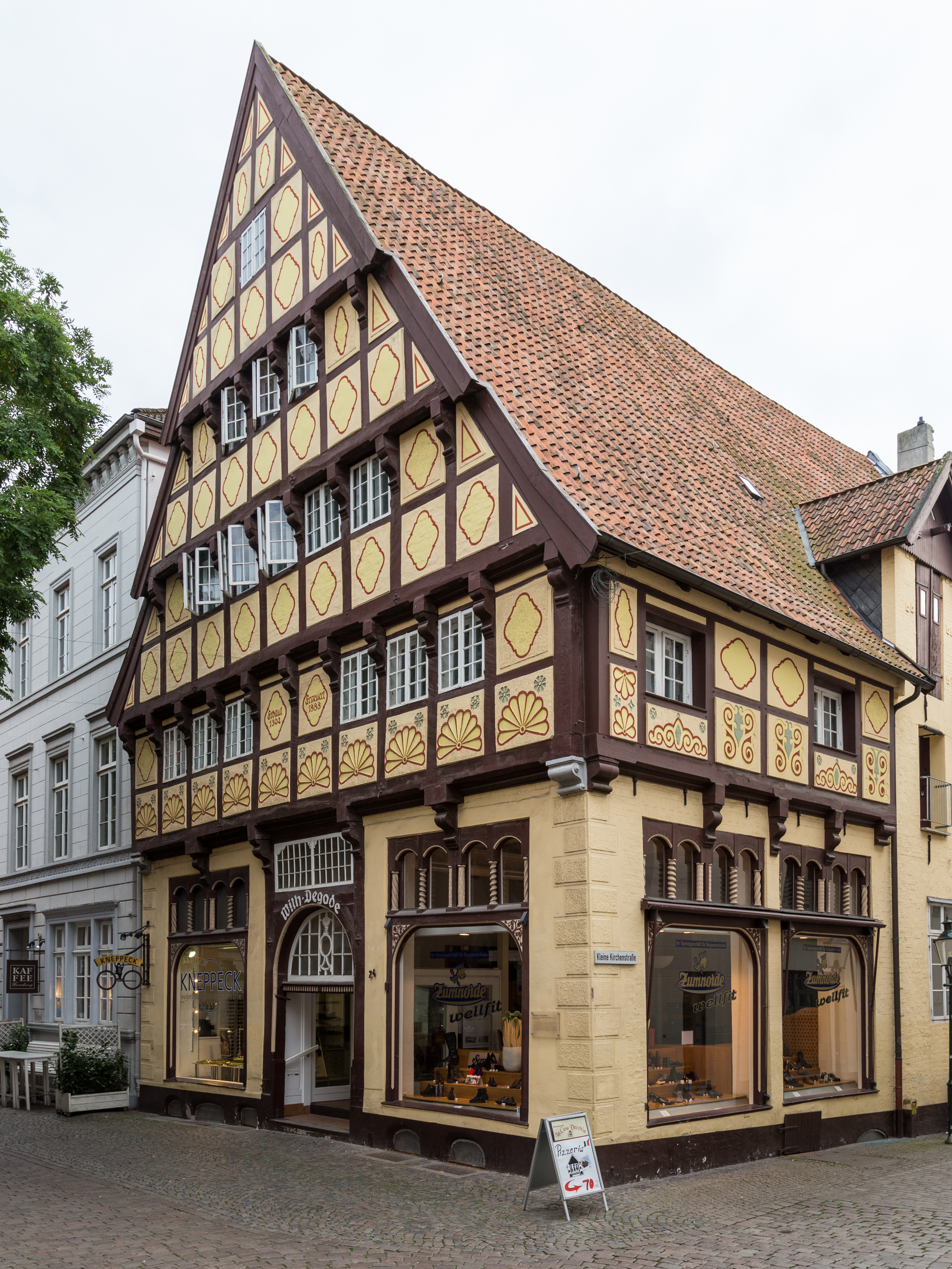 Degode-Haus in Oldenburg (Oldb)